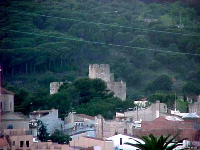 Castell de Vilassar de Dalt, comarca del Maresme